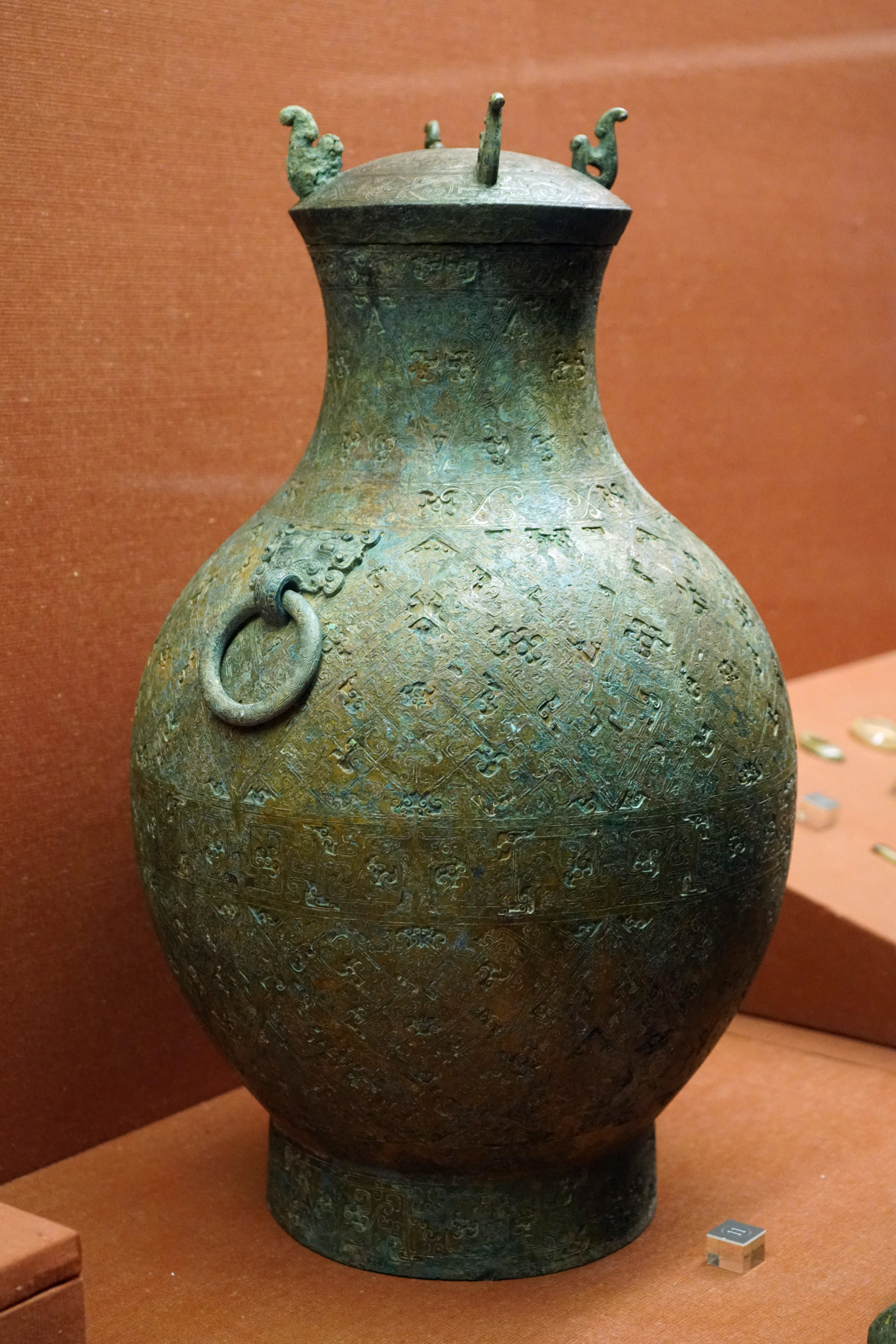 中文（中国大陆）: 错银铜壶 西汉 涪陵小田溪